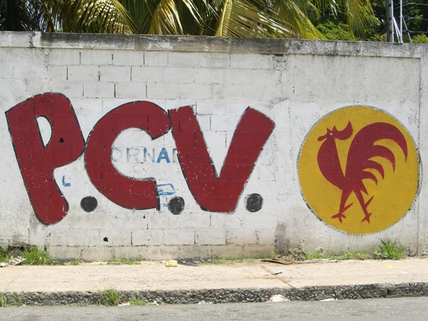 Logo del Partido Comunista de Venezuela dibujado en un muro.